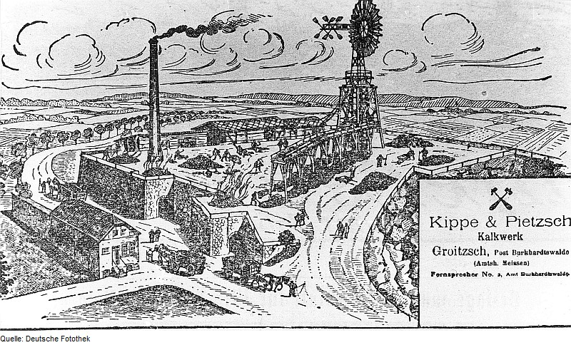 Original image description from the Deutsche Fotothek Triebischtal-Groitzsch. Kalkwerk, aus: Unsere Heimat Sept. 1912